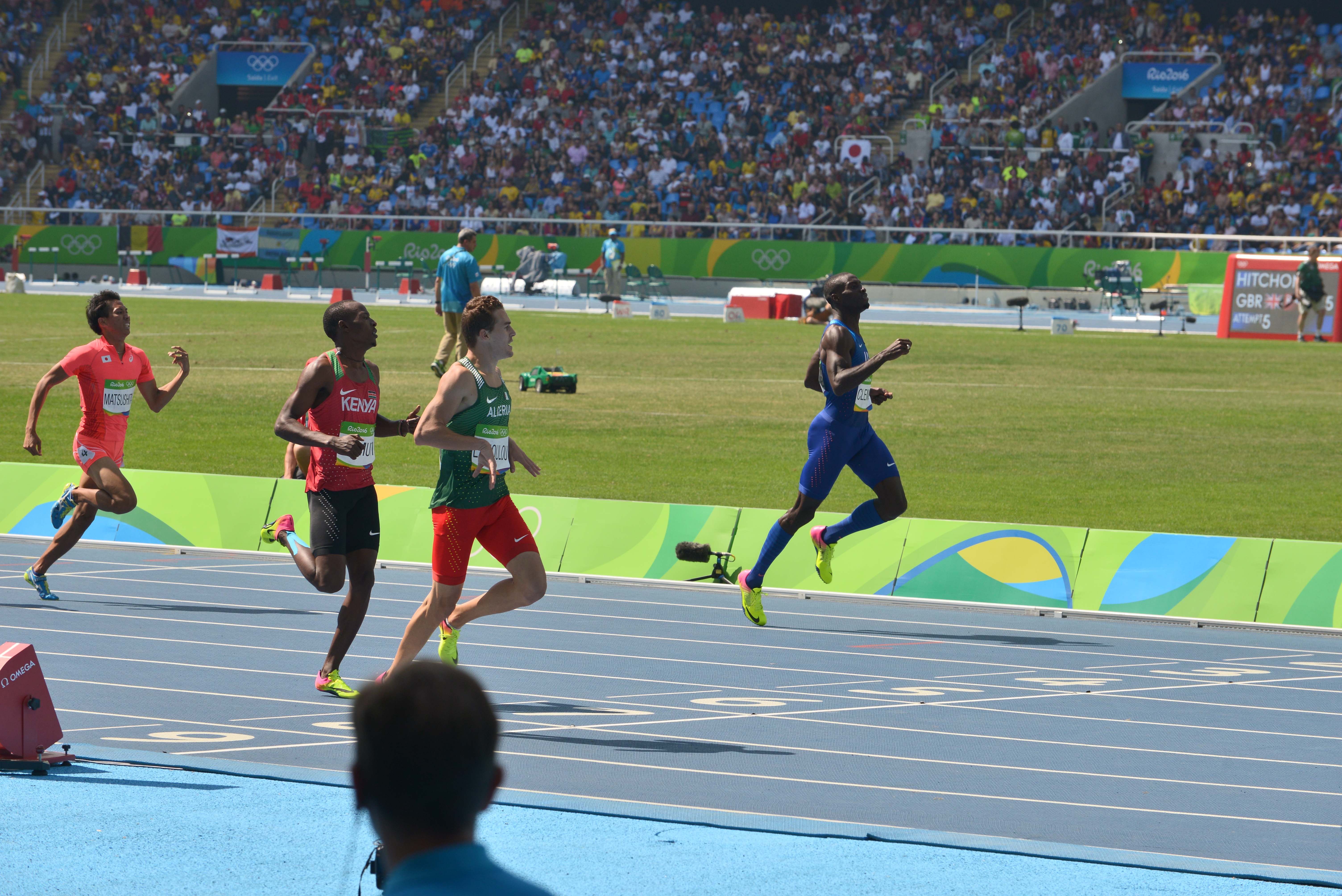 Quelques séries du 400m haies des jo de Rio 2016